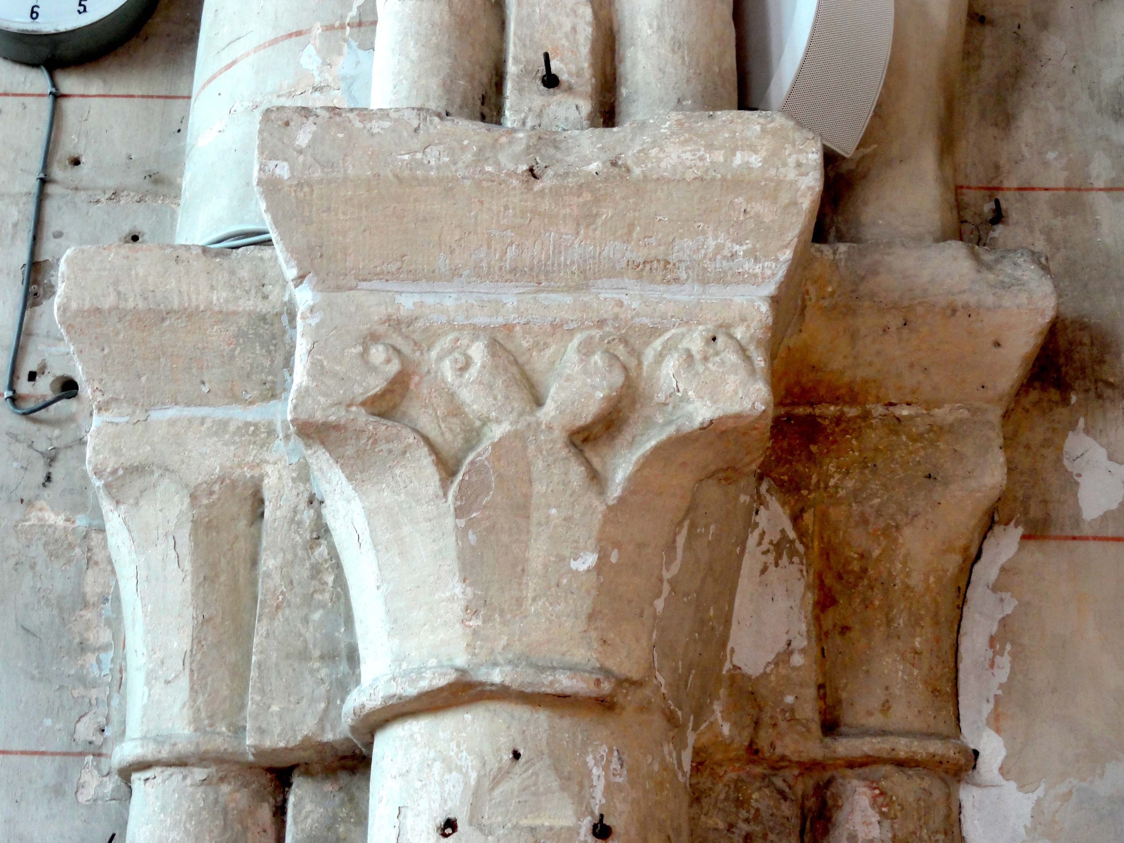 Chapiteau (voir titre).